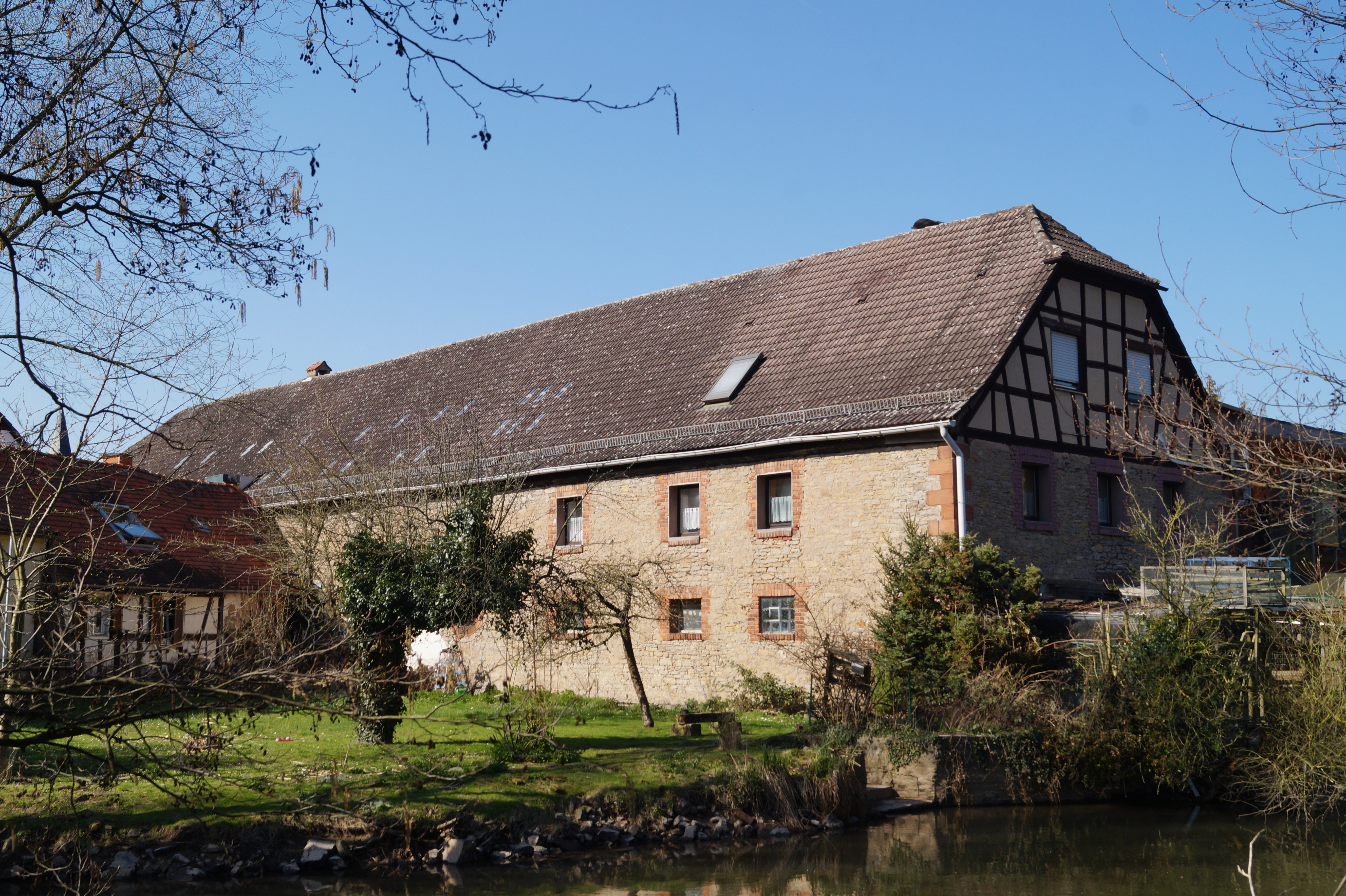 Ehemalige Herren- oder Zehntscheune in Rückingen, Stadt Erlensee in Hessen als Teil des 1909/1912 abgerissenen Herrenhofs. Ansicht von der Kinzigseite.